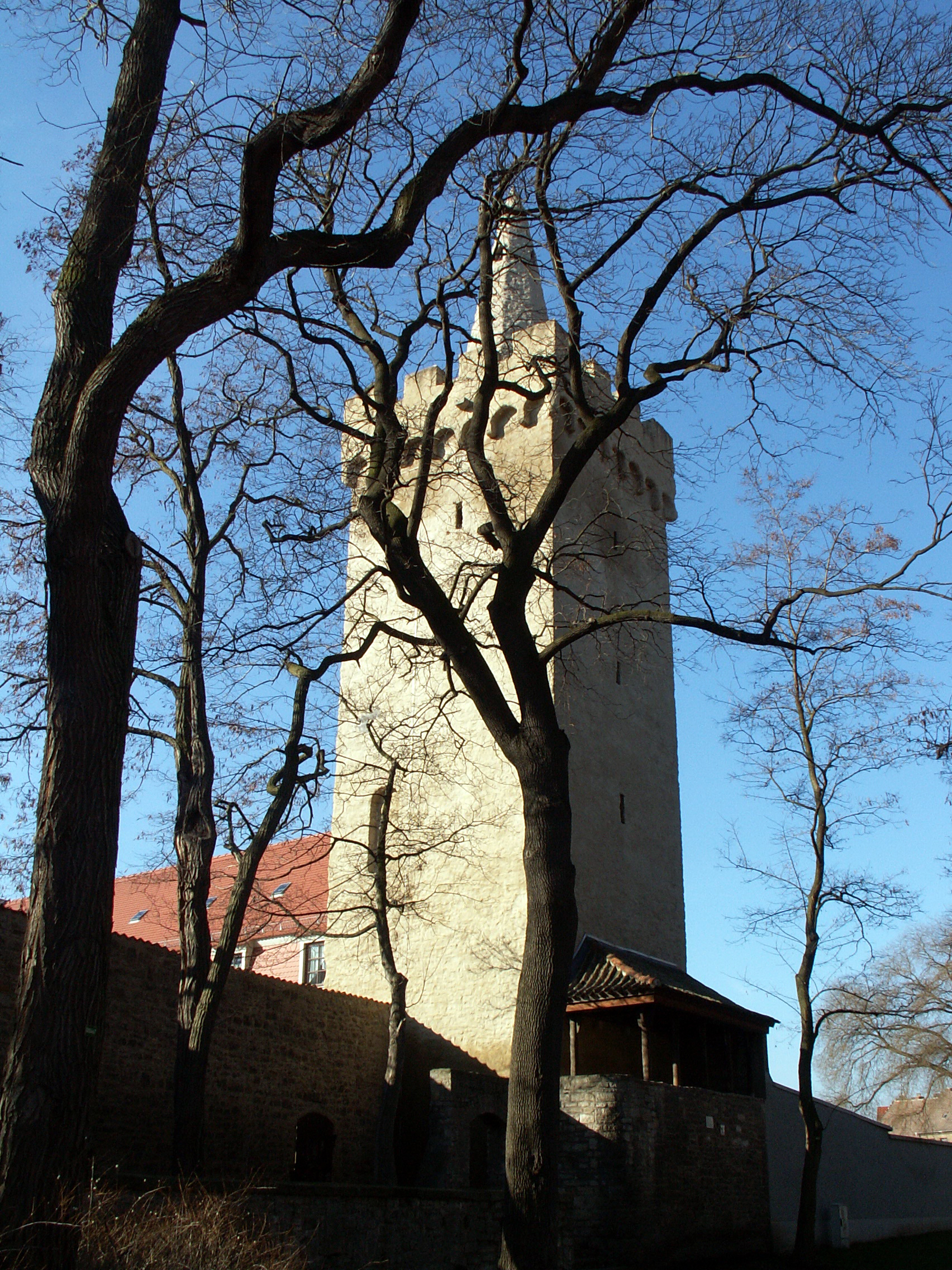 Rabenturm in der Johannispromenade zu Aschersleben